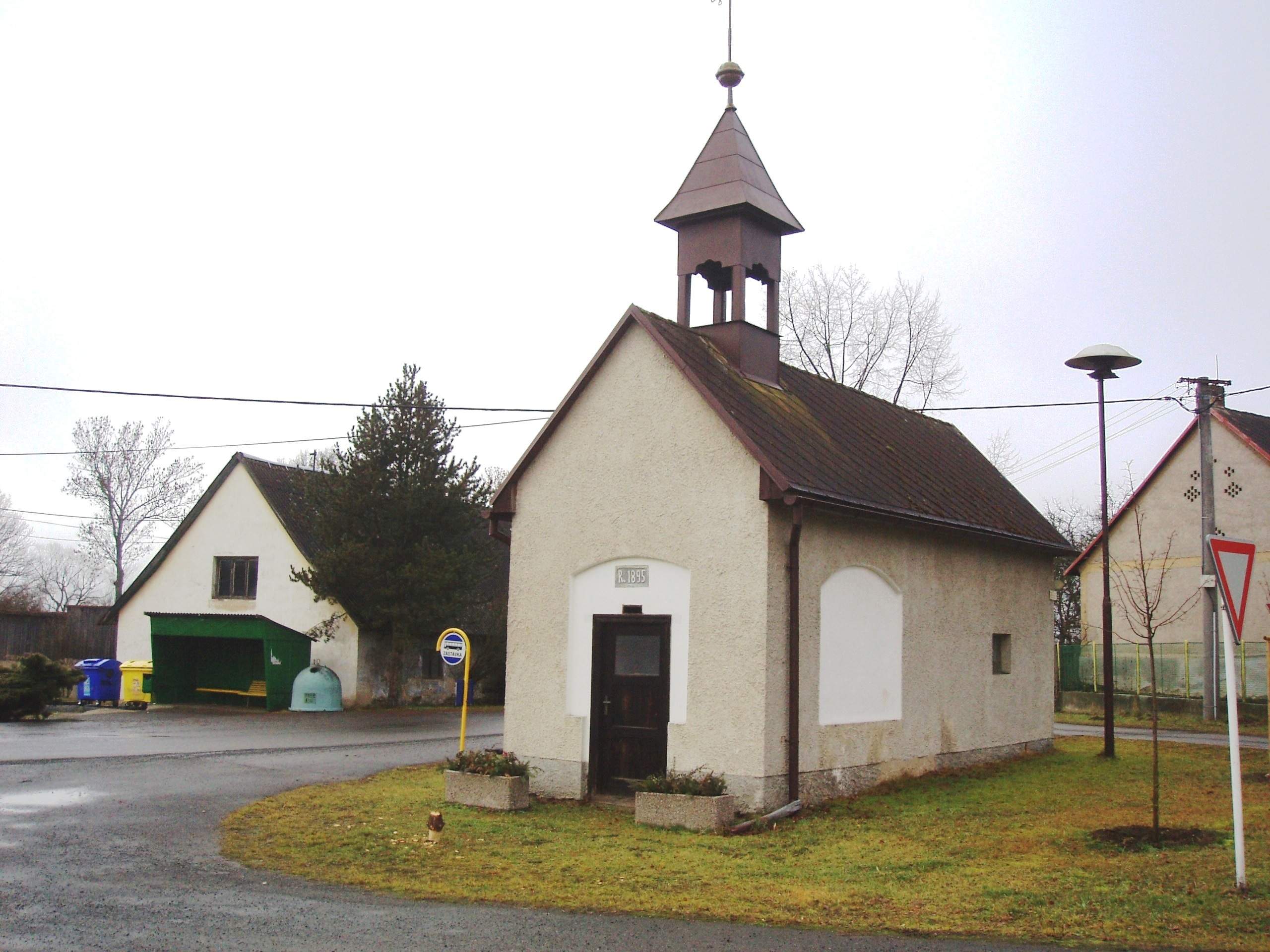 Kaple v obci Strýčkovy u Rožmitálu p.Tř.